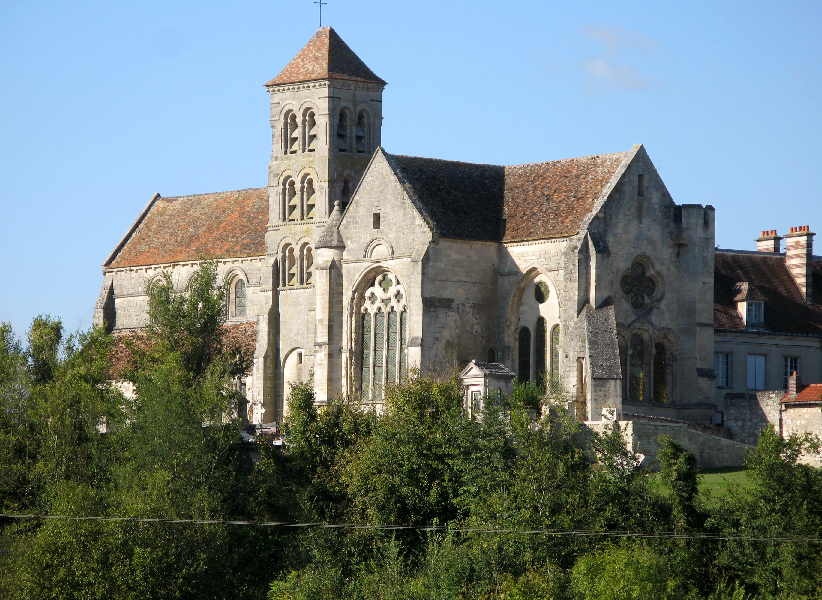 Oulchy-le-Château (Aisne, France) - L'église Notre-Dame, vue depuis la route de Cugny-les-Crouttes, juste à la sortie Sud-Est de la commune. . .